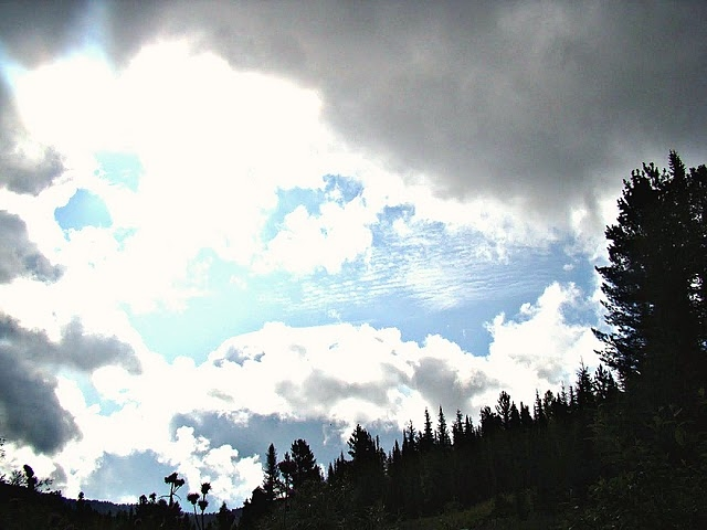 Алтай. Август 2009.